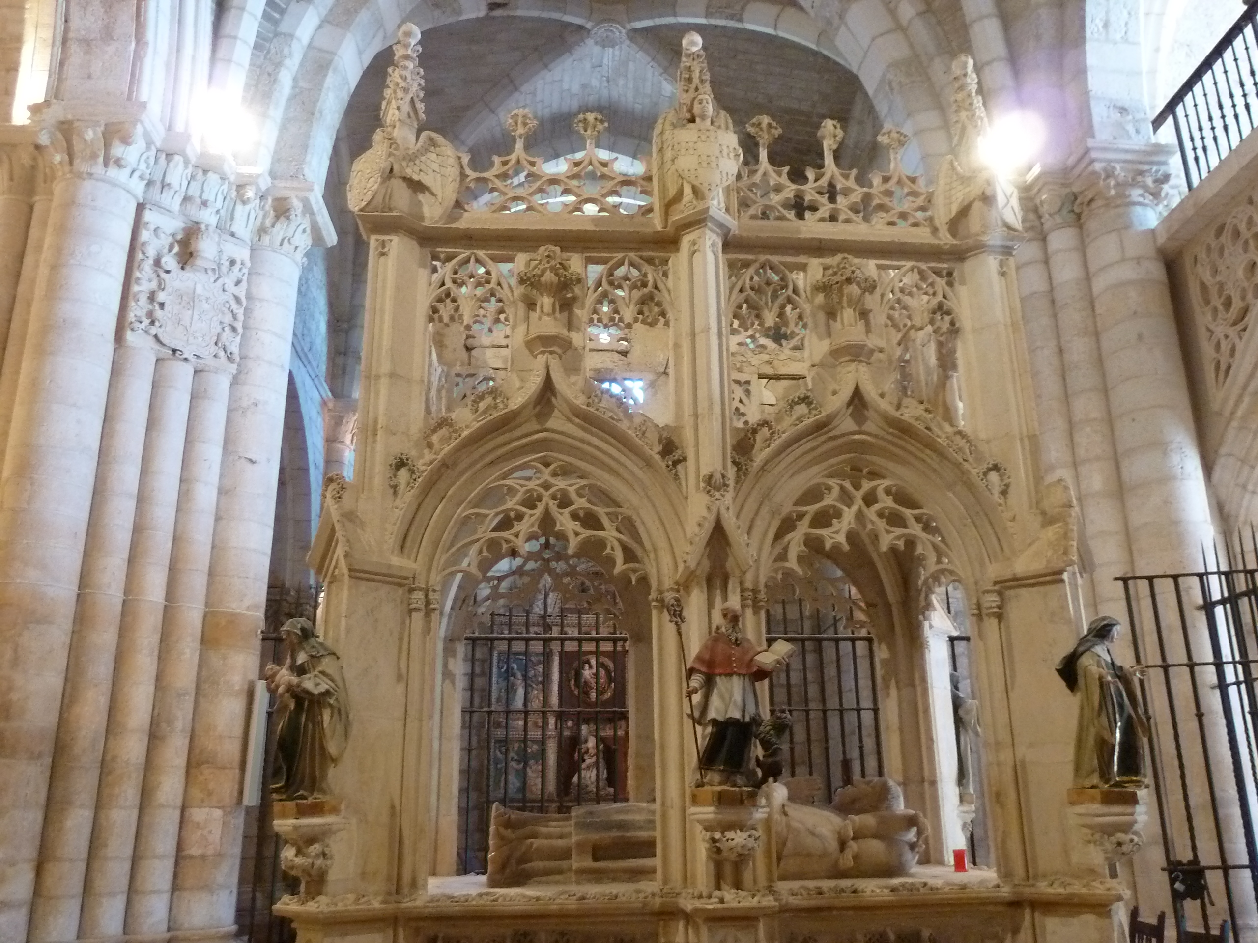 La influencia jerónima también la vemos en las figuras de madera policromada que se añaden al baldaquino gótico en la época barroca representando a: San Jerónimo como doctor de la Iglesia latina; Santa Marcela, matrona romana que conoció al santo en el Aventino; Santa Paula, principal discípula de San Jerónimo, llevando en sus manos el libro de la Vulgata; Santa Eustoquio, hija de Santa Paula y sucesora suya como abadesa de Belén, que tiene el Niño Jesús en sus manos; el obispo San Paulino de Nola, que se carteaba con San Jerónimo; y San Eusebio Cremonense, con el báculo del monasterio en el que sucedió a San Jerónimo.